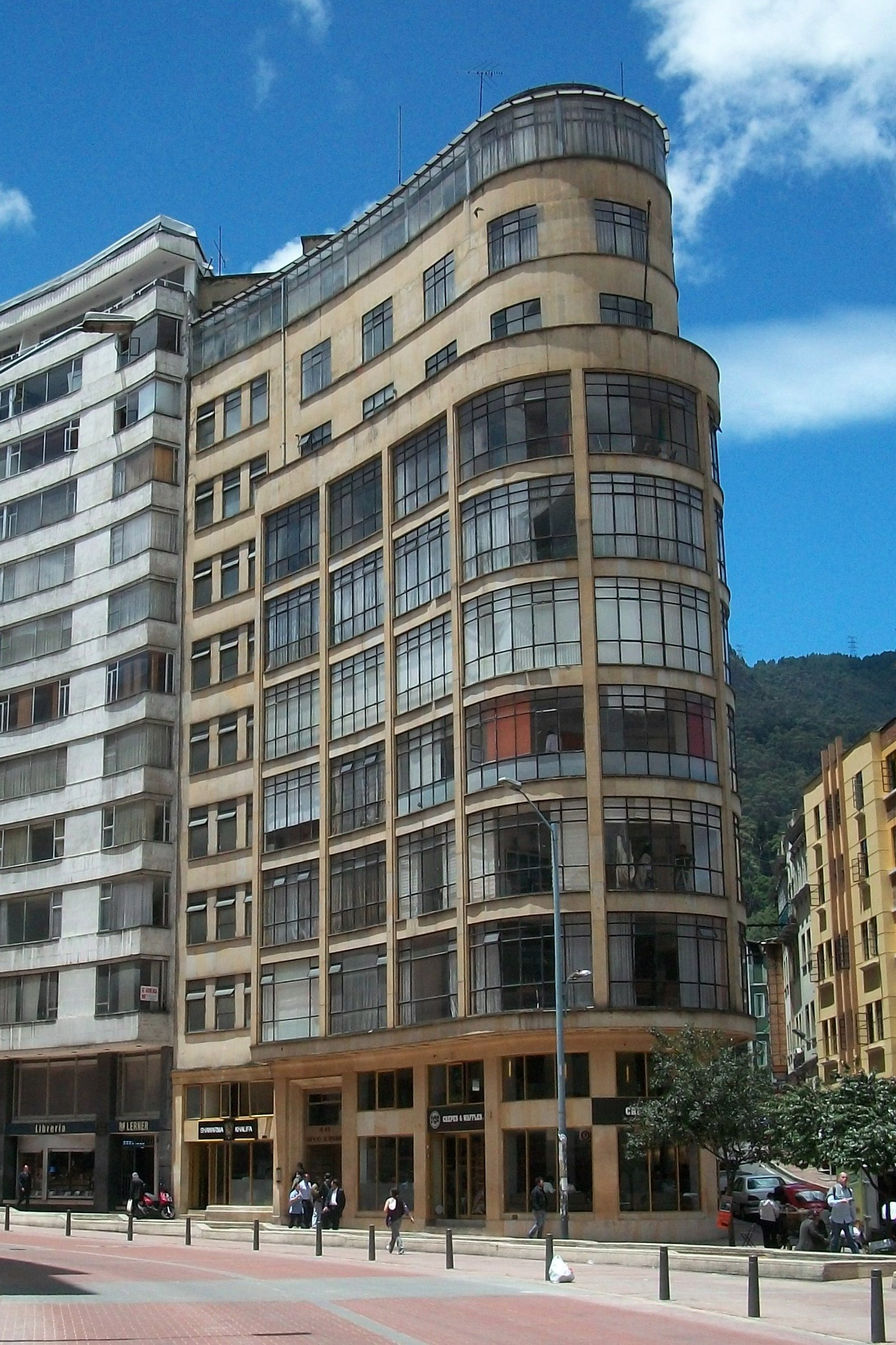 Eje Ambiental en Bogotá, carrera Sexta. Edificio Moserrate, antigua sede del diario El Espectador.